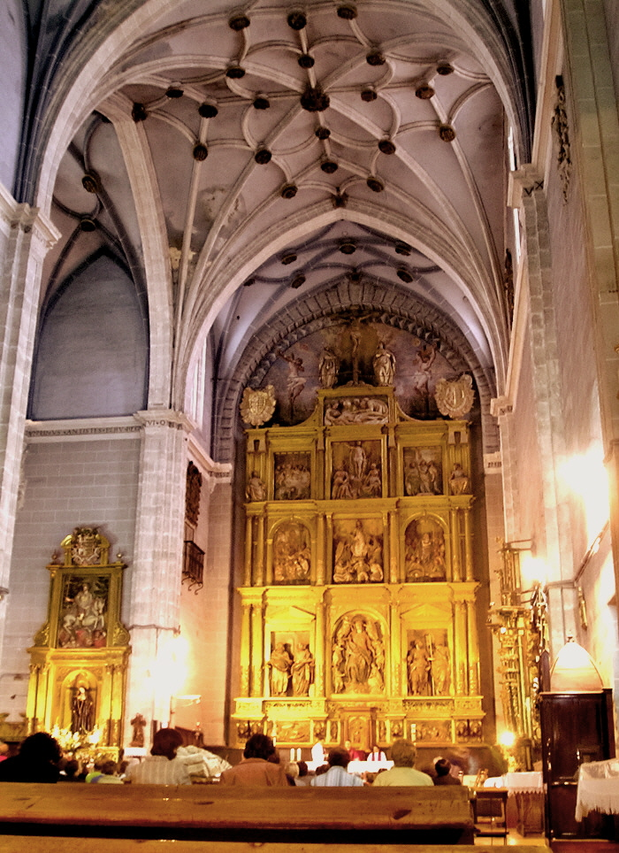 Interior de la iglesia parroquial de Santa María Magdalena mirando hacia la capilla mayor, con el retablo de Esteban Jordán (siglo XVI) haci